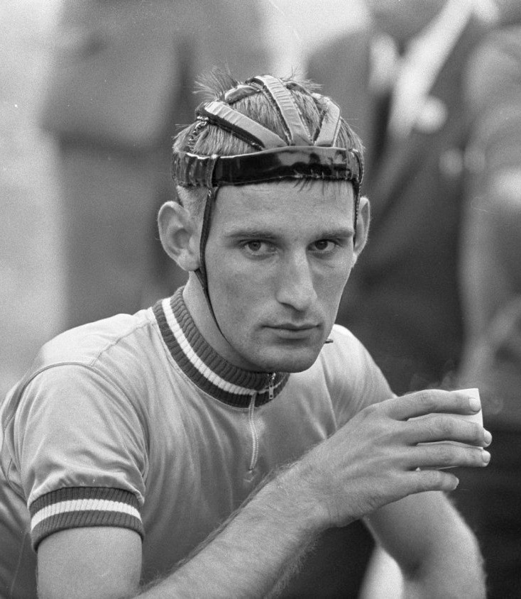 Tiemen Groen en 1967.